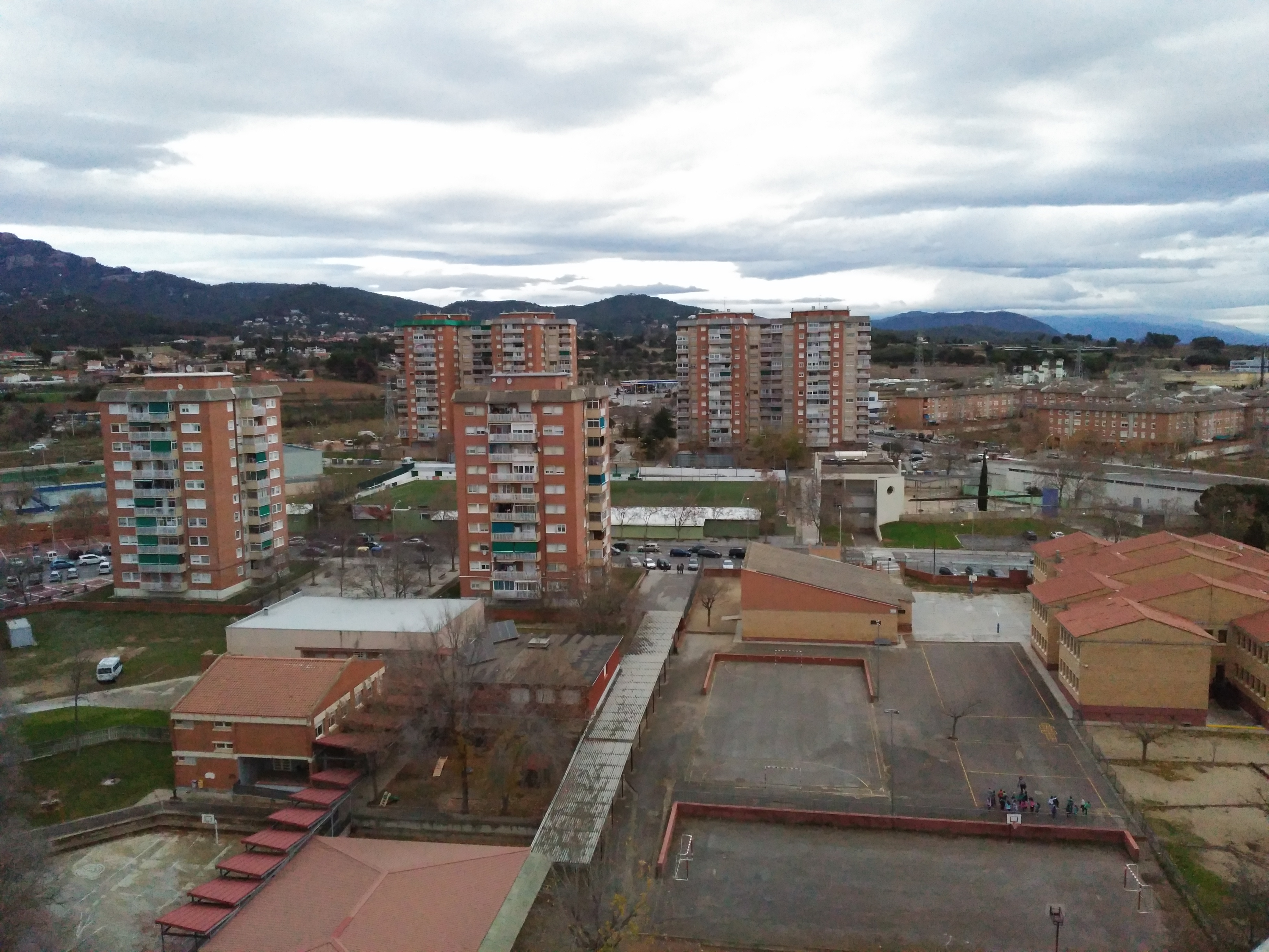 Vista del barrio del Pla del Bon Aire